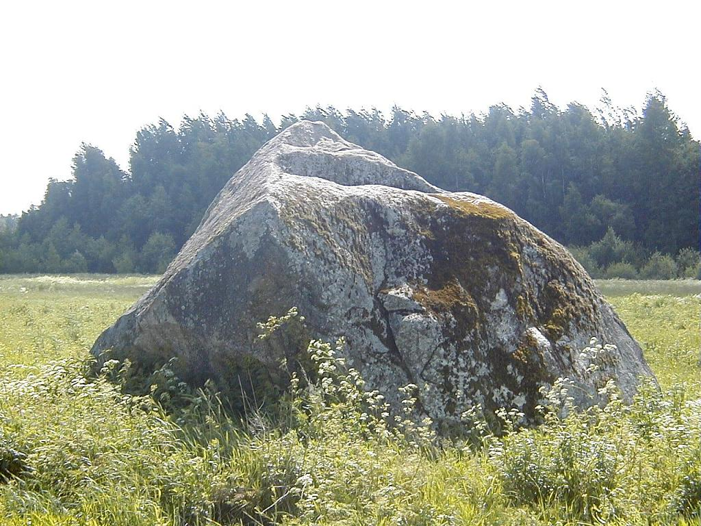 Meļķitāru Muldakmens 2002-06-15